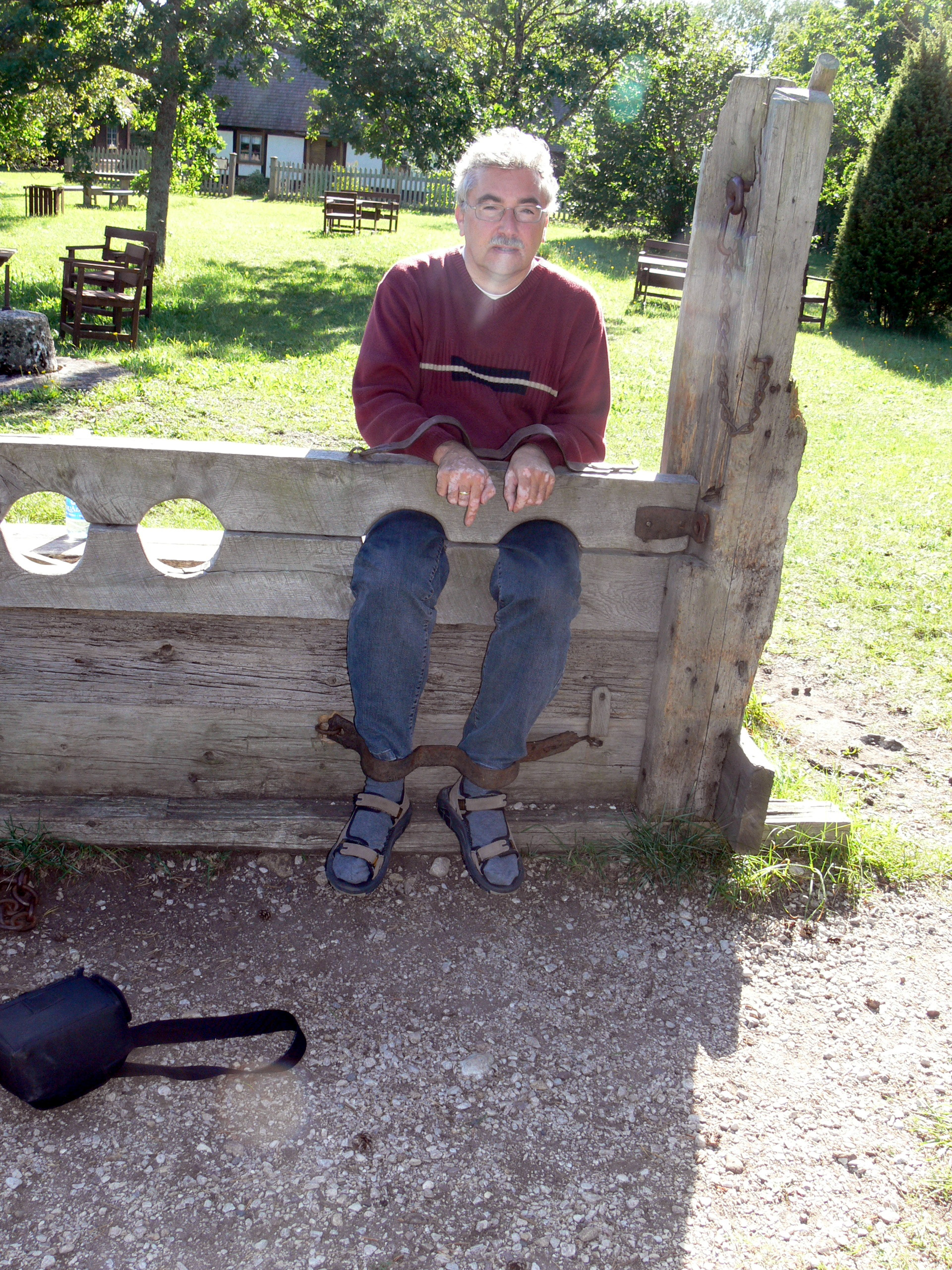 Bunge Museum auf Gotland. Pranger oder Stock ( mit Author )